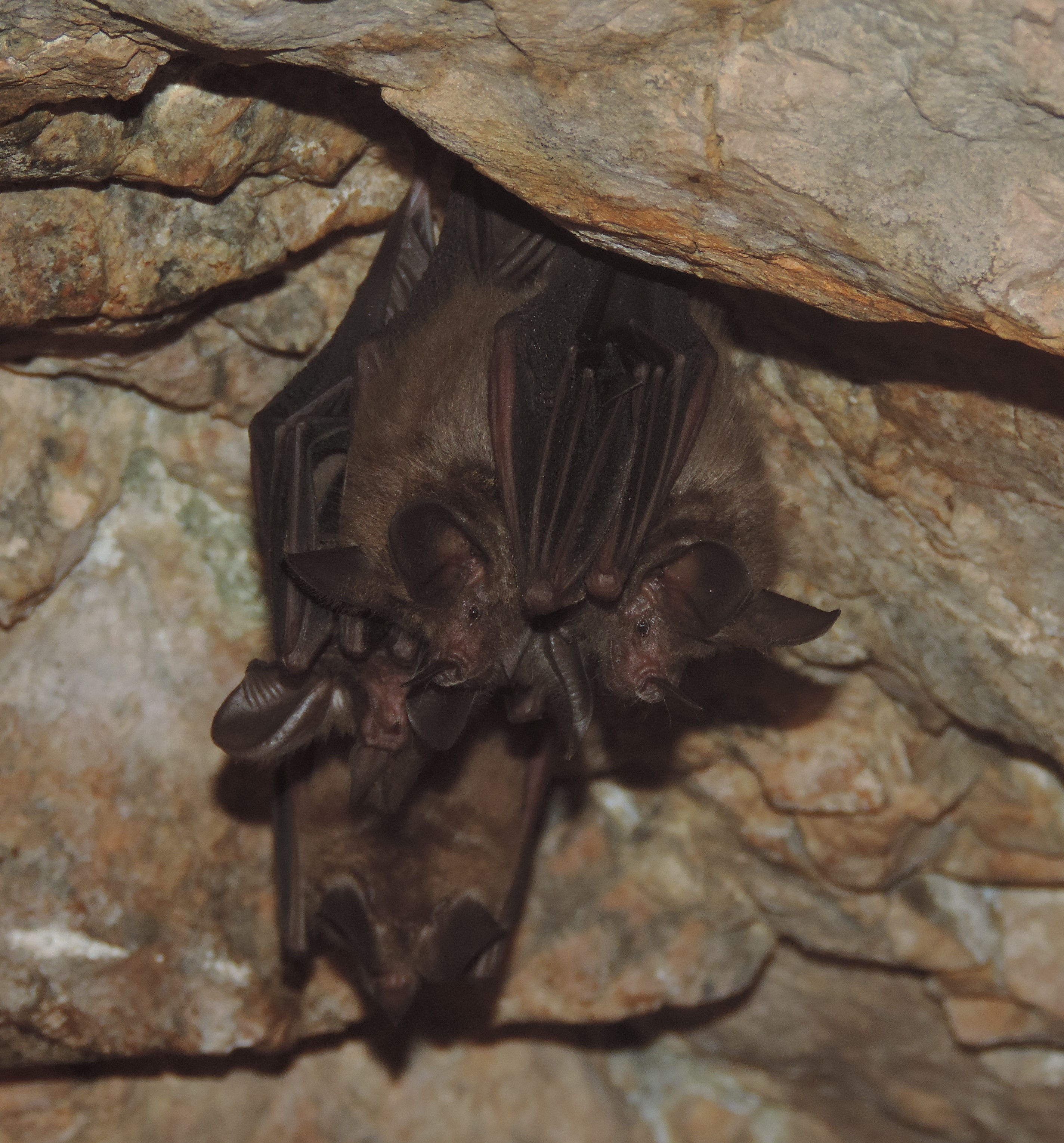 Macho protegendo um grupo de fêmeas